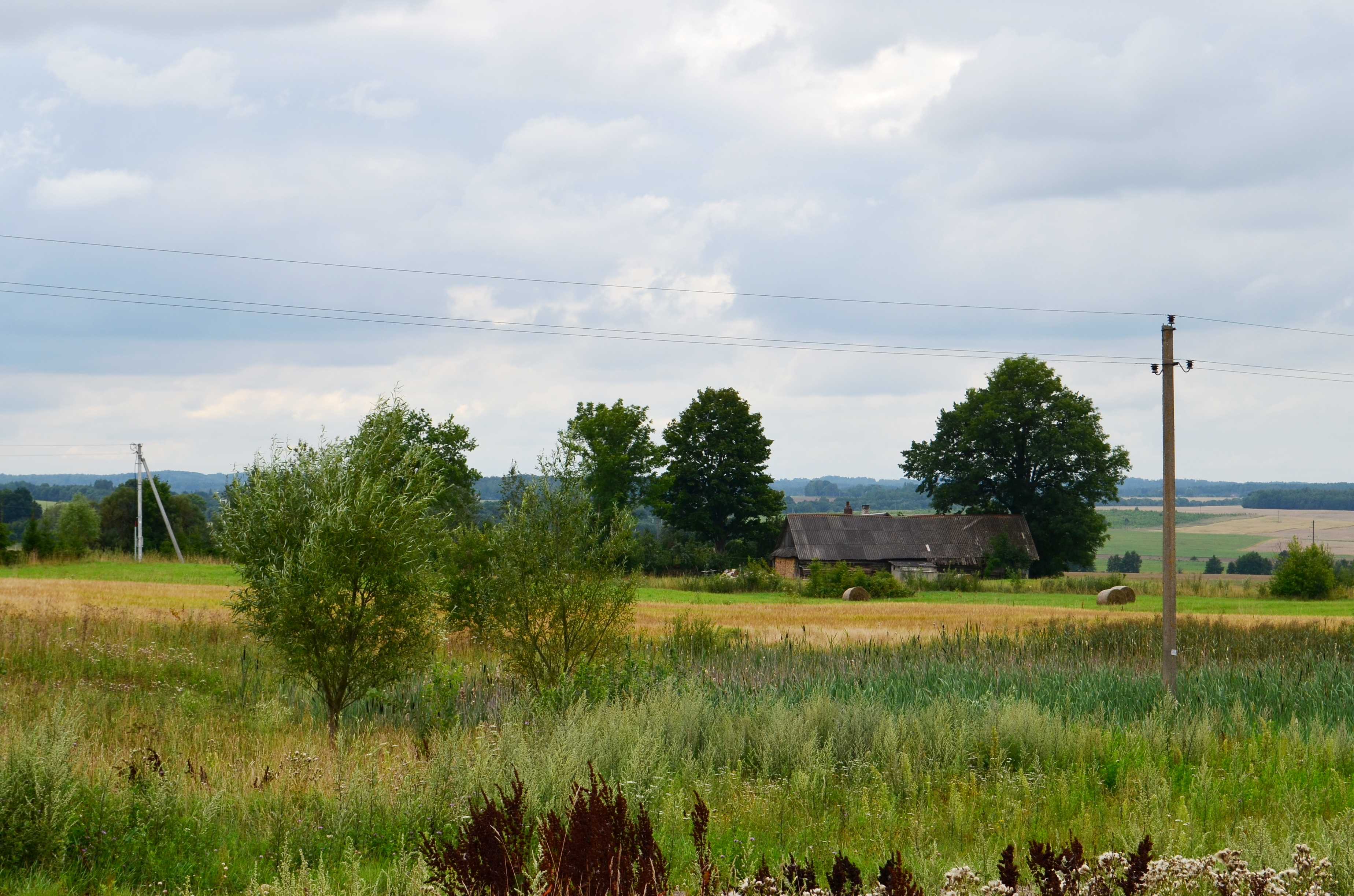 Izabelinės k., N. Daugėliškio sen., Ignalinos raj.